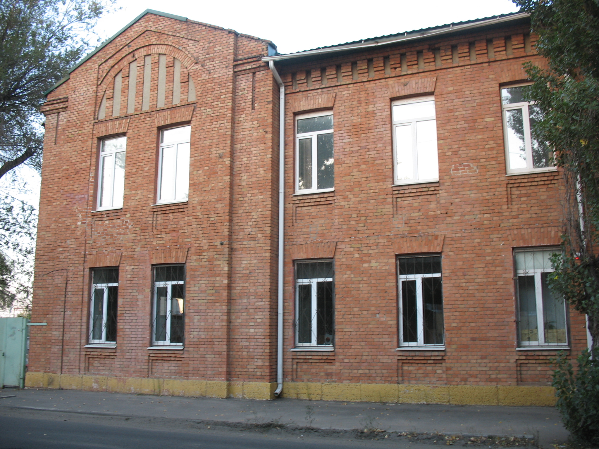 Жилой дом железнодорожников: улица Богдана Хмельницкого, 13, Воронеж, Воронежская область